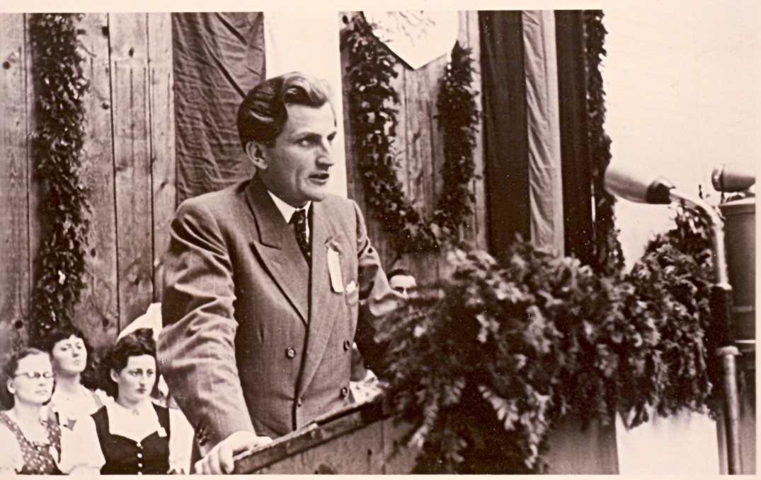 Walter Fr.Schleser (VHDS eV) als Vertreter aller deutschen Vertriebenenverbände im Juni 1952 bei der Ehrenpromotion von Father Emmanuel Reichenberger in Graz